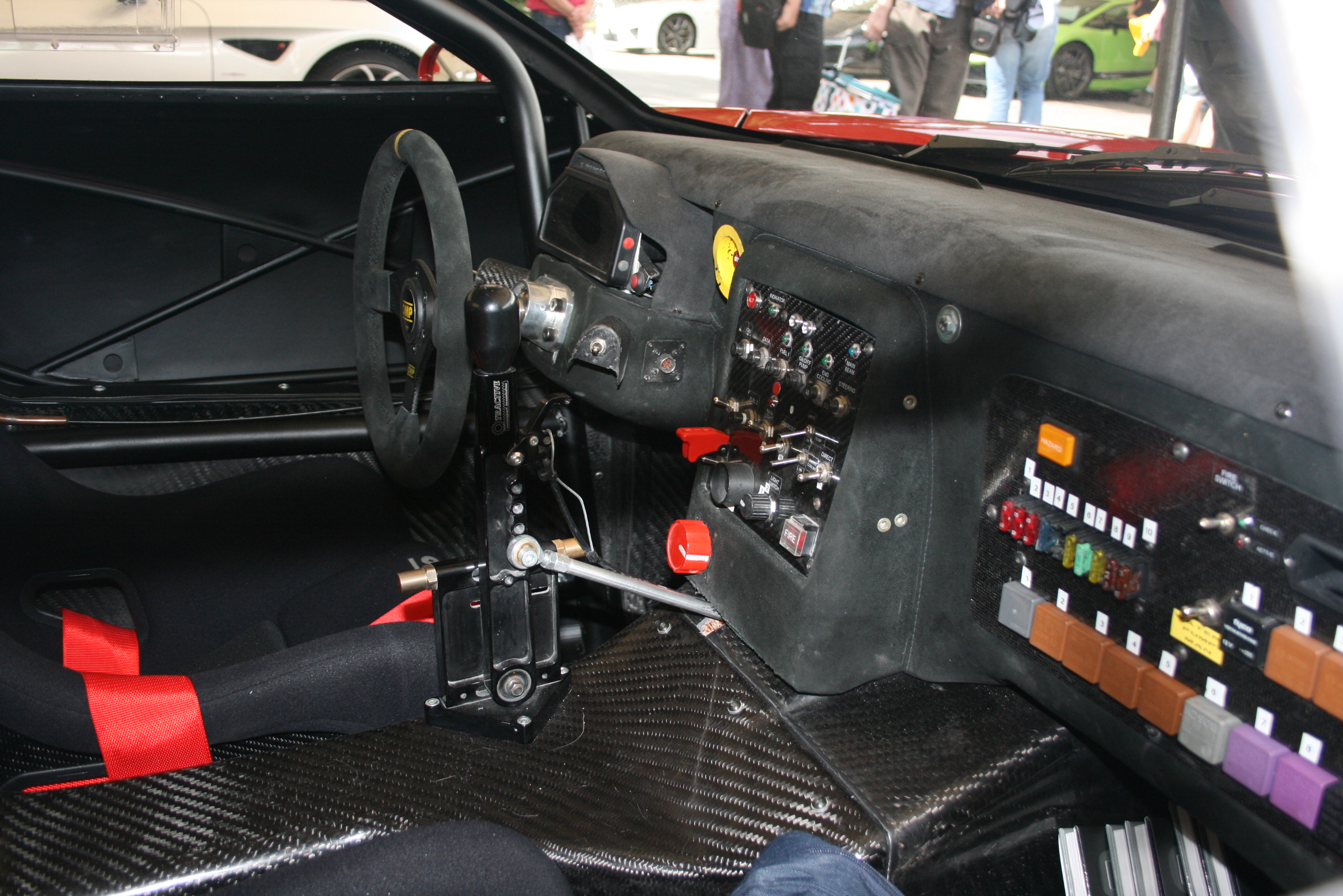 full racing interior